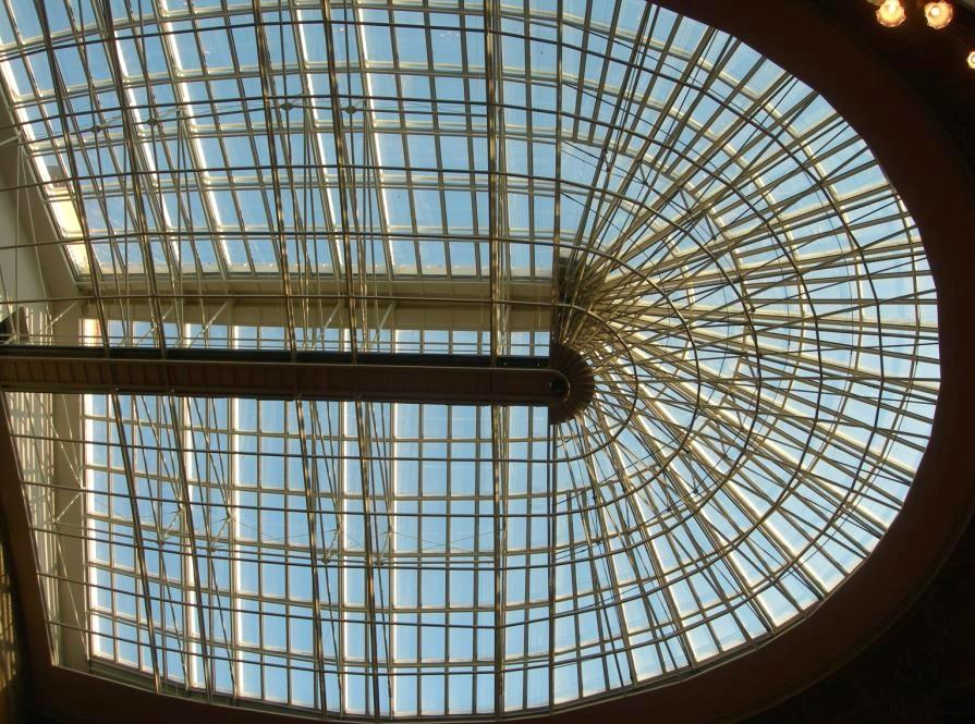 Livorno: il Teatro Goldoni, progettato da Giuseppe Cappellini e inaugurato nel 1847. Nella foto la straordinaria copertura vetrata progettata da Cappellini e ripristinata nel grande restauro conclusosi nel 2004.